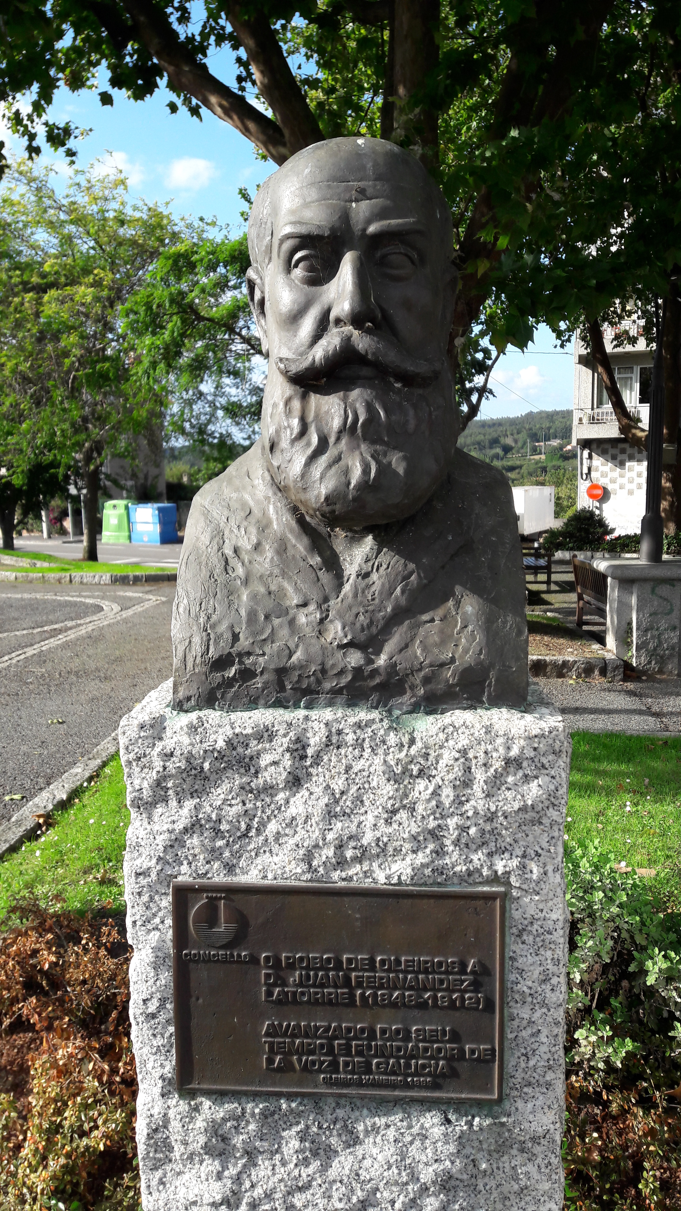 Monumento a Juan Fernández Latorre na praza da Rabadeira, Oleiros